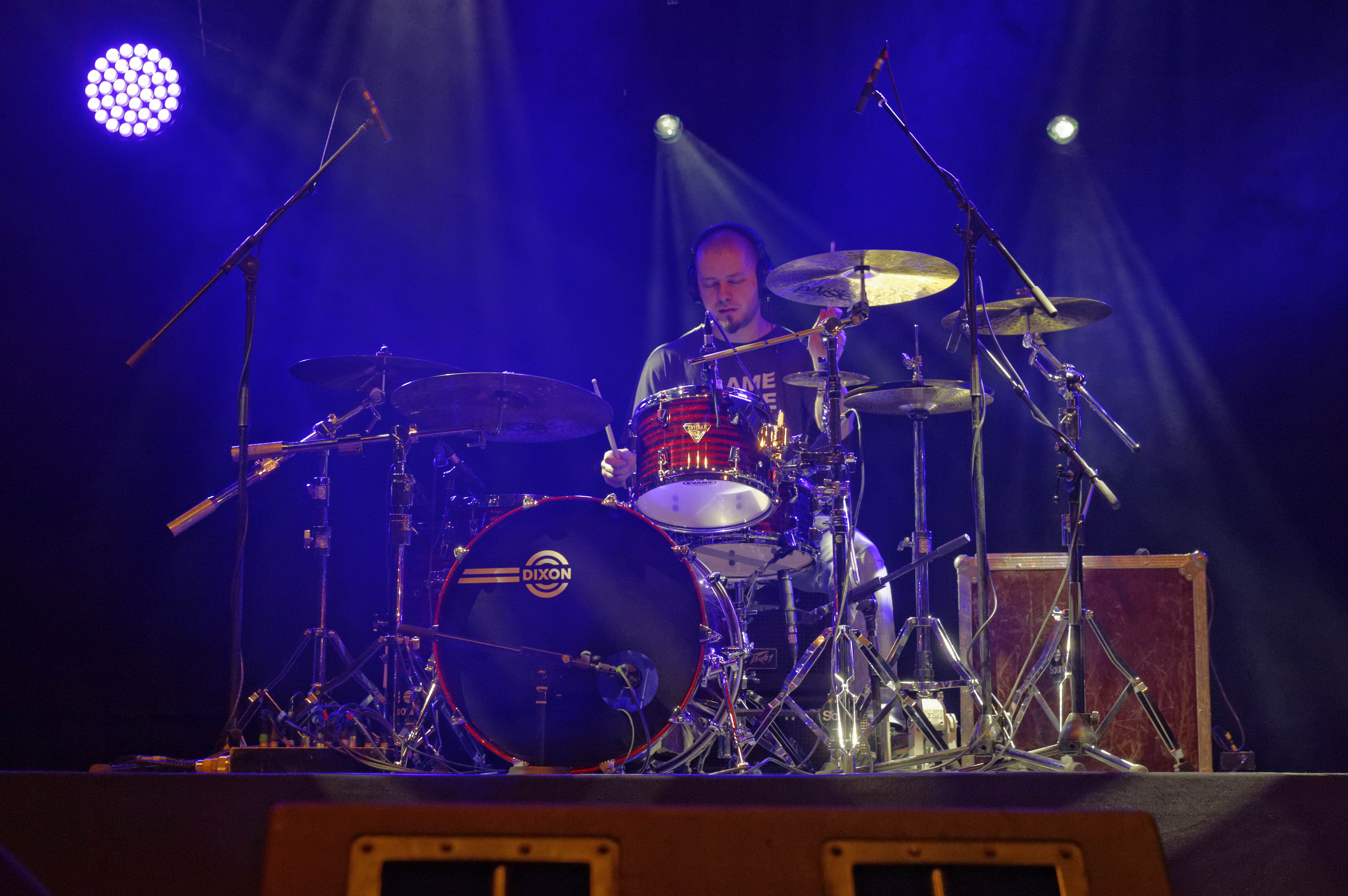 Momme Boe auf der Musikmesse Frankfurt 2013